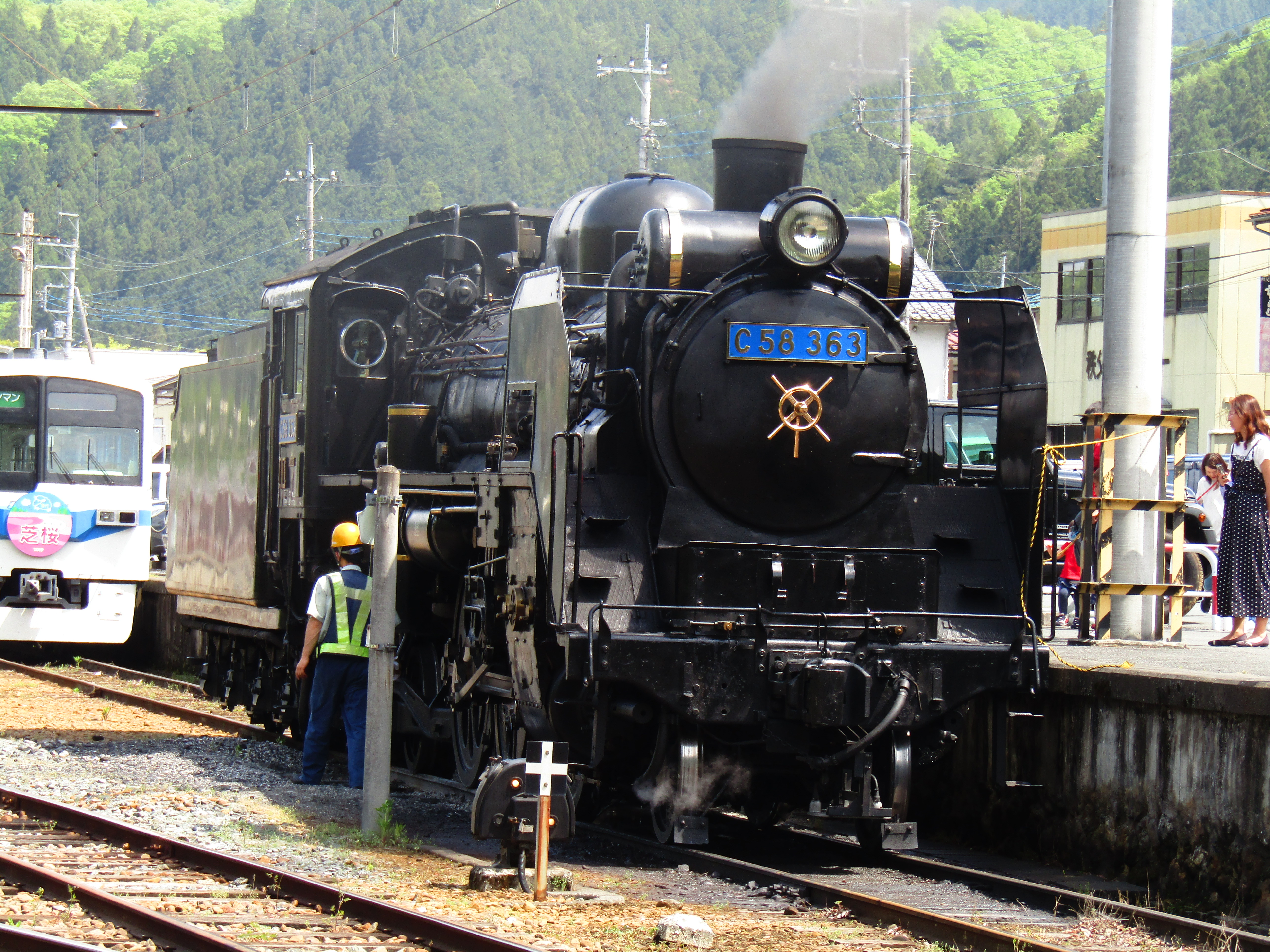 C58363 青プレート